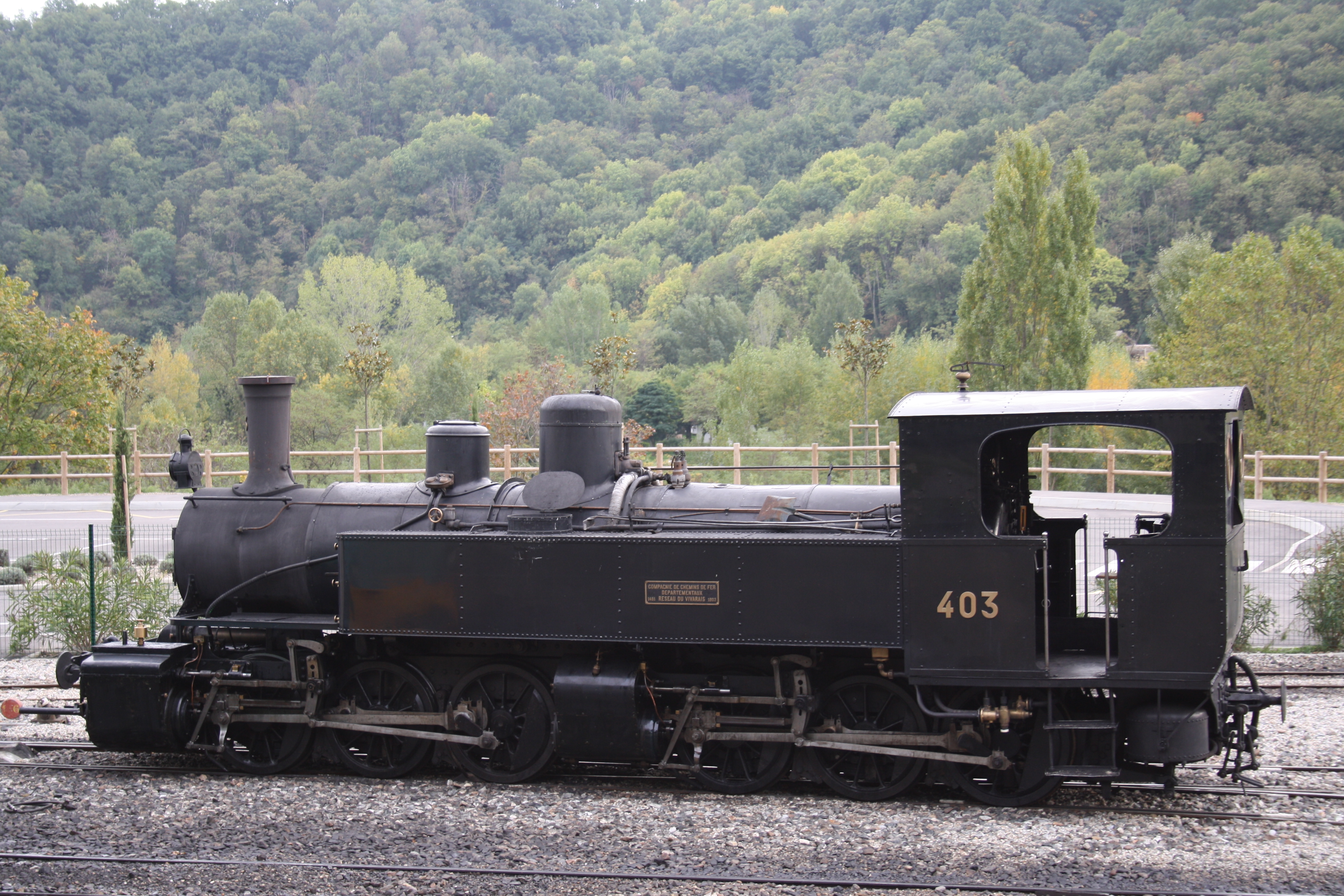 Mallet 403 des Chemin de fer de l'Ardèche